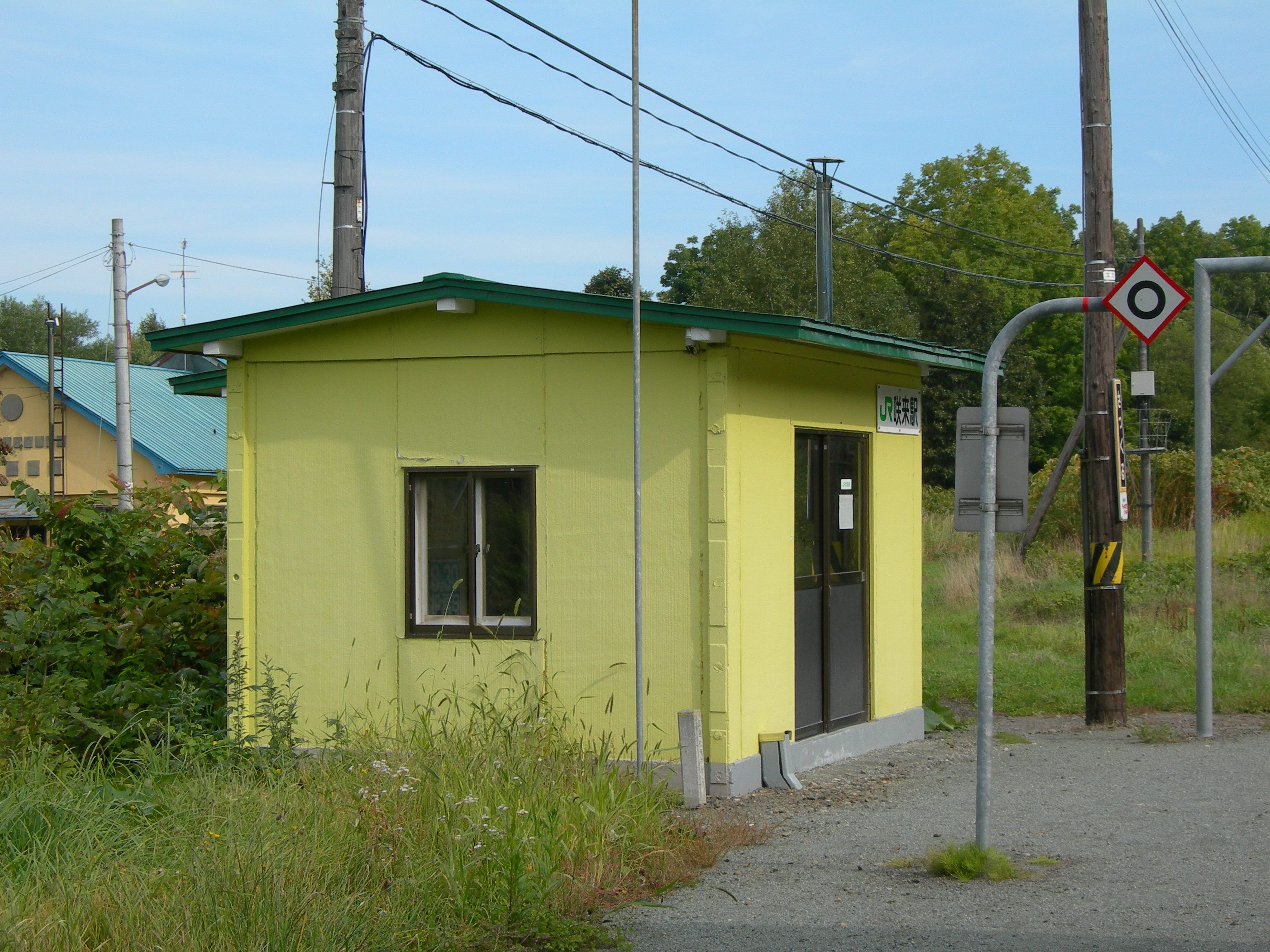 咲来駅駅舎